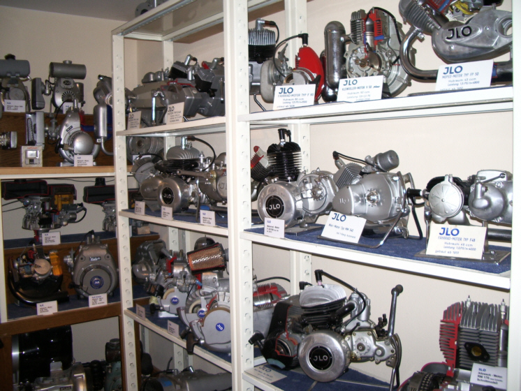 Jlo Motorensammlung aus dem Stadt- und Heimatgeschichtlichem Museum Uetersen.